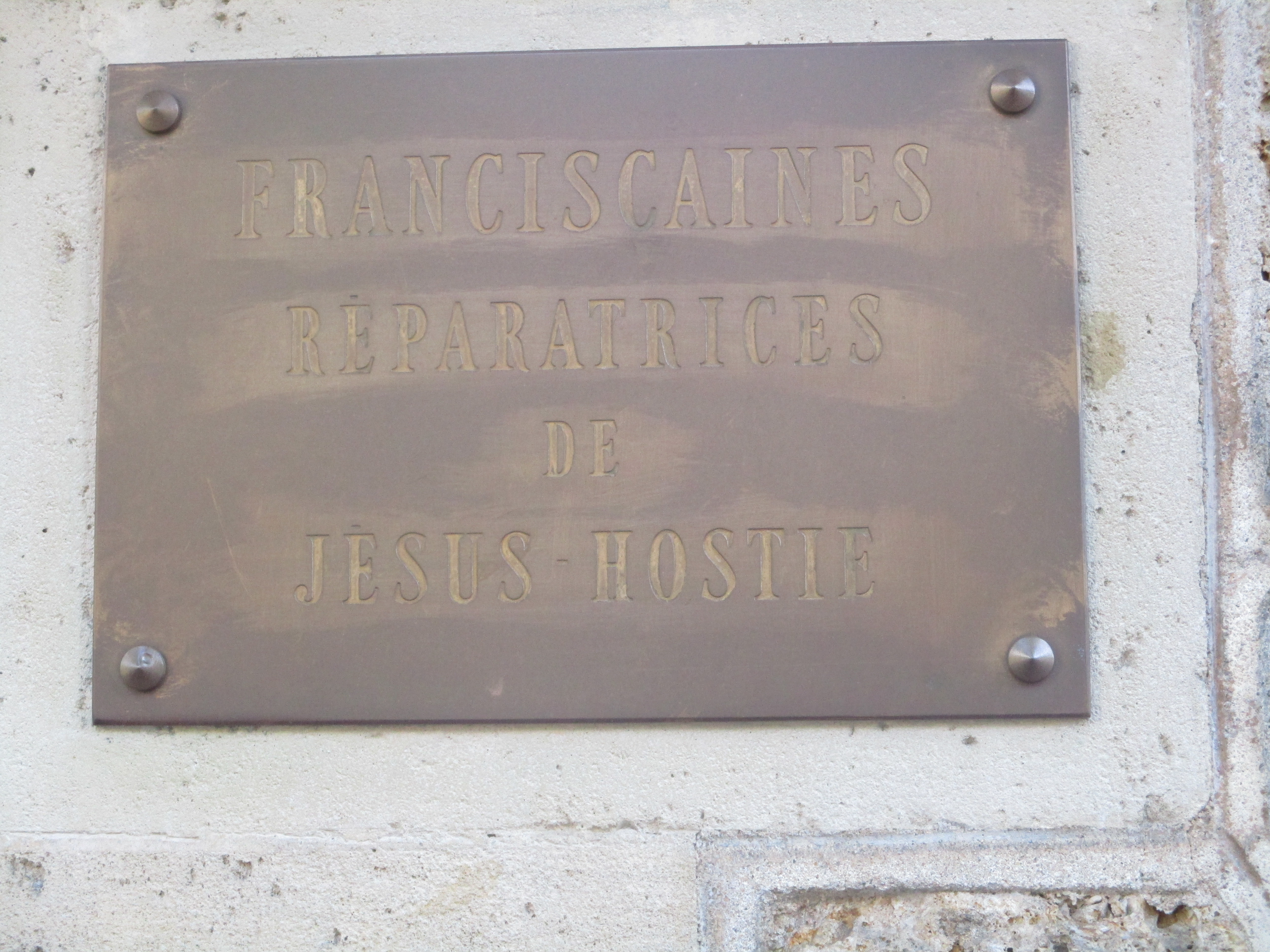 Franciscaines réparatrices de Jésus-Hostie, 127 avenue de Villiers, Paris XVIIe. Congrégation fondée à Paris par le chanoine Le Roux. Couvent et chapelle inaugurés en 1897.